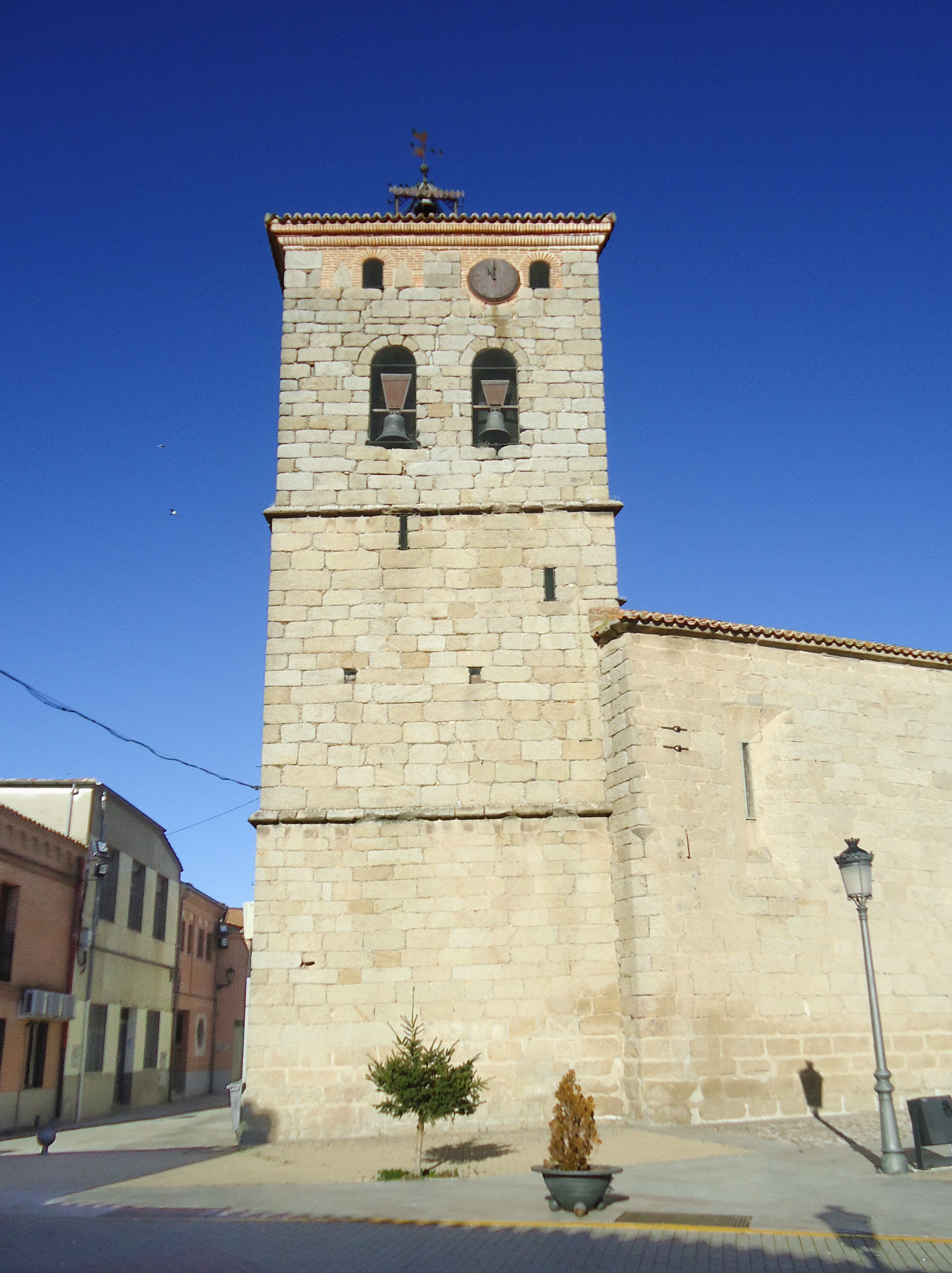 Iglesia parroquial de Nuestra Señora del Castillo, torre-atalaya. Construida probablemente en el siglo XII.